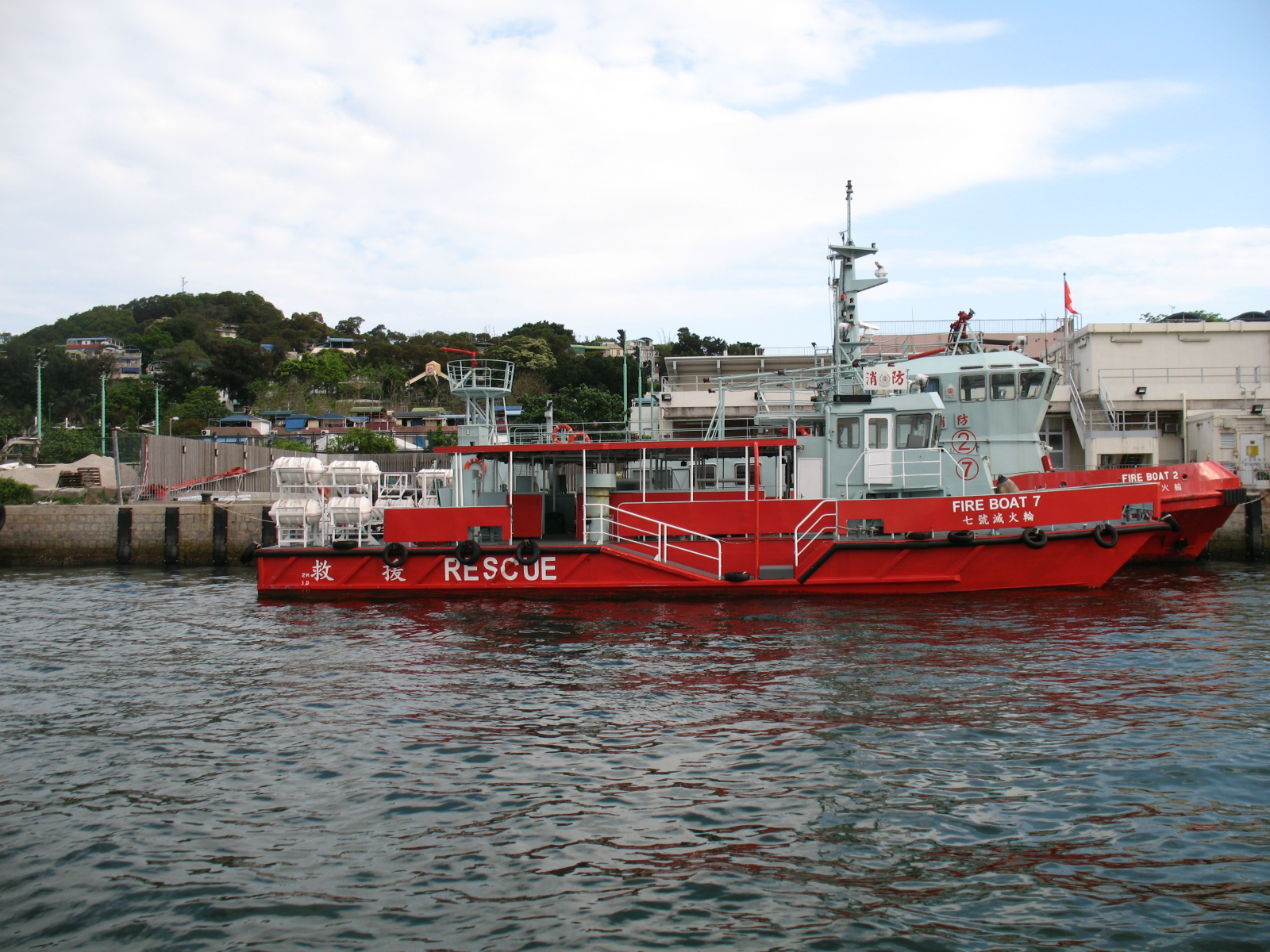 中文(香港):香港消防處旗下一艘雙體救援滅火輪，名為七號滅火輪，此船前身為啟德機場海上消防救援隊局之一，現今為後備滅火輪。